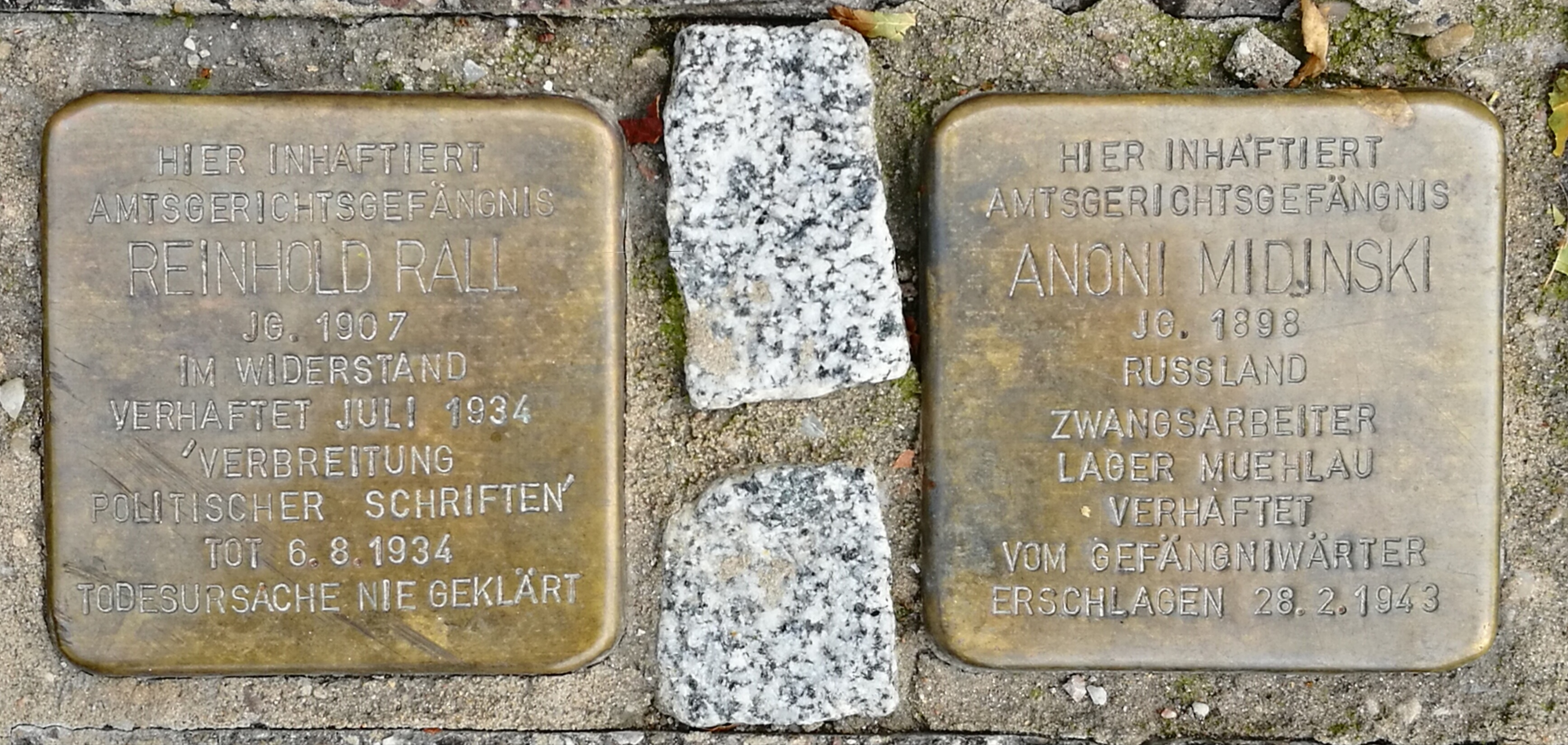 Deutschland (D) - Baden-Württemberg (BW) - Landkreis Tuttlingen (TUT) - Tuttlingen: Stolpersteine Midinski & Rall